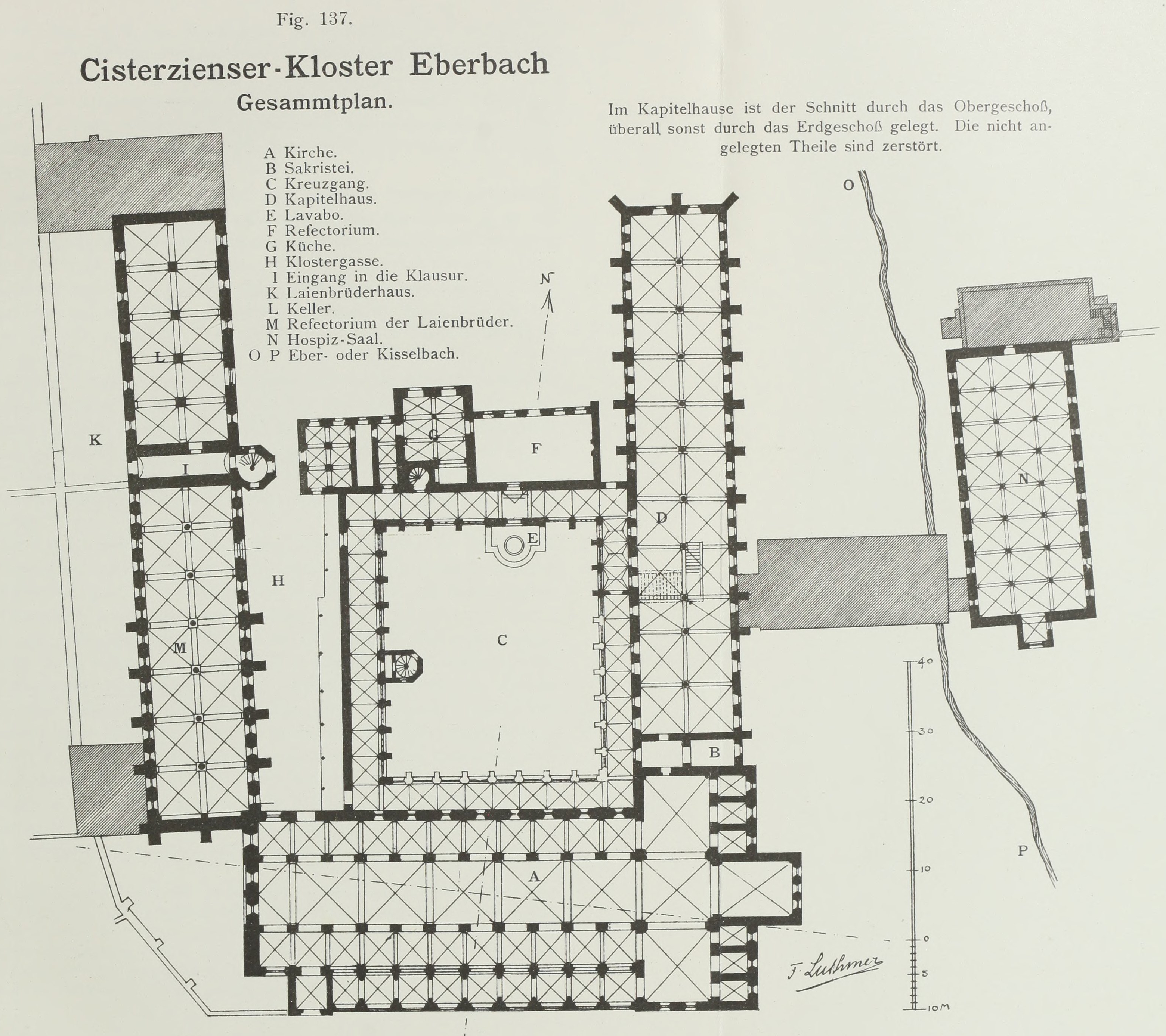 Cisterzienser-Kloster Eberbach Gesammtplan